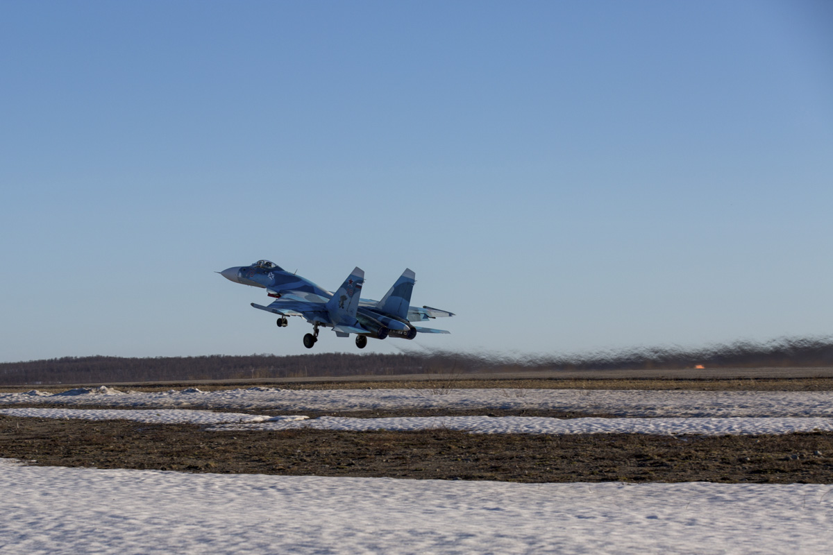 Плановые полёты лётчиков 279-го отдельного корабельного истребительного авиационного полка Северного флота на палубных истребителях Су-33 и штурмовиках Су-25УТГ (аэродром Североморск-3, Мурманская обл.)